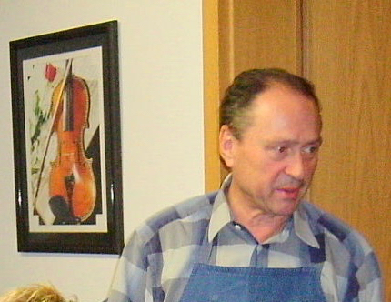 Geigenbaumeister in Regensburg